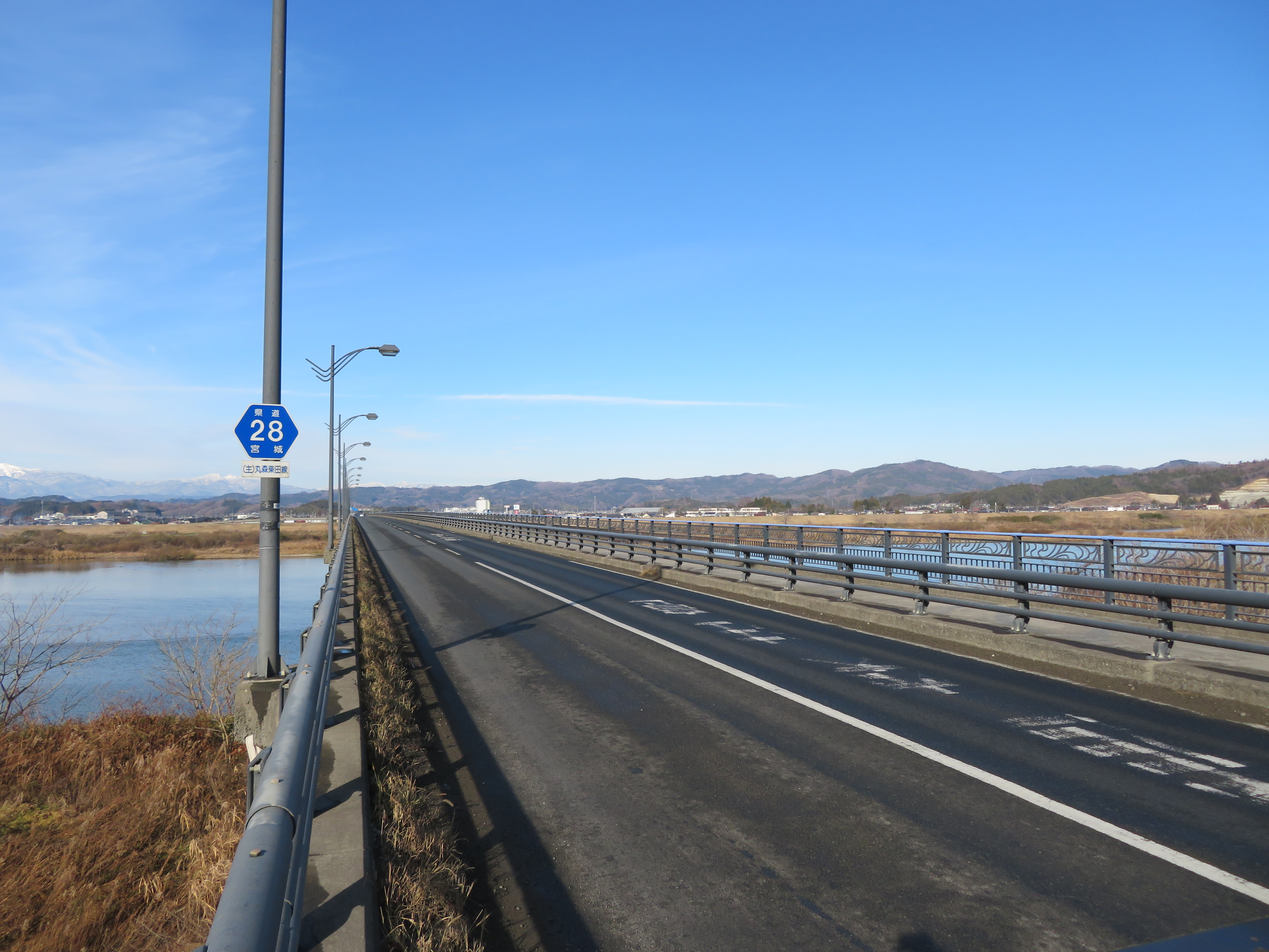 宮城県道２８号線角田市鳩原付近（槻木大橋） Canon PowerShot SX720 HS